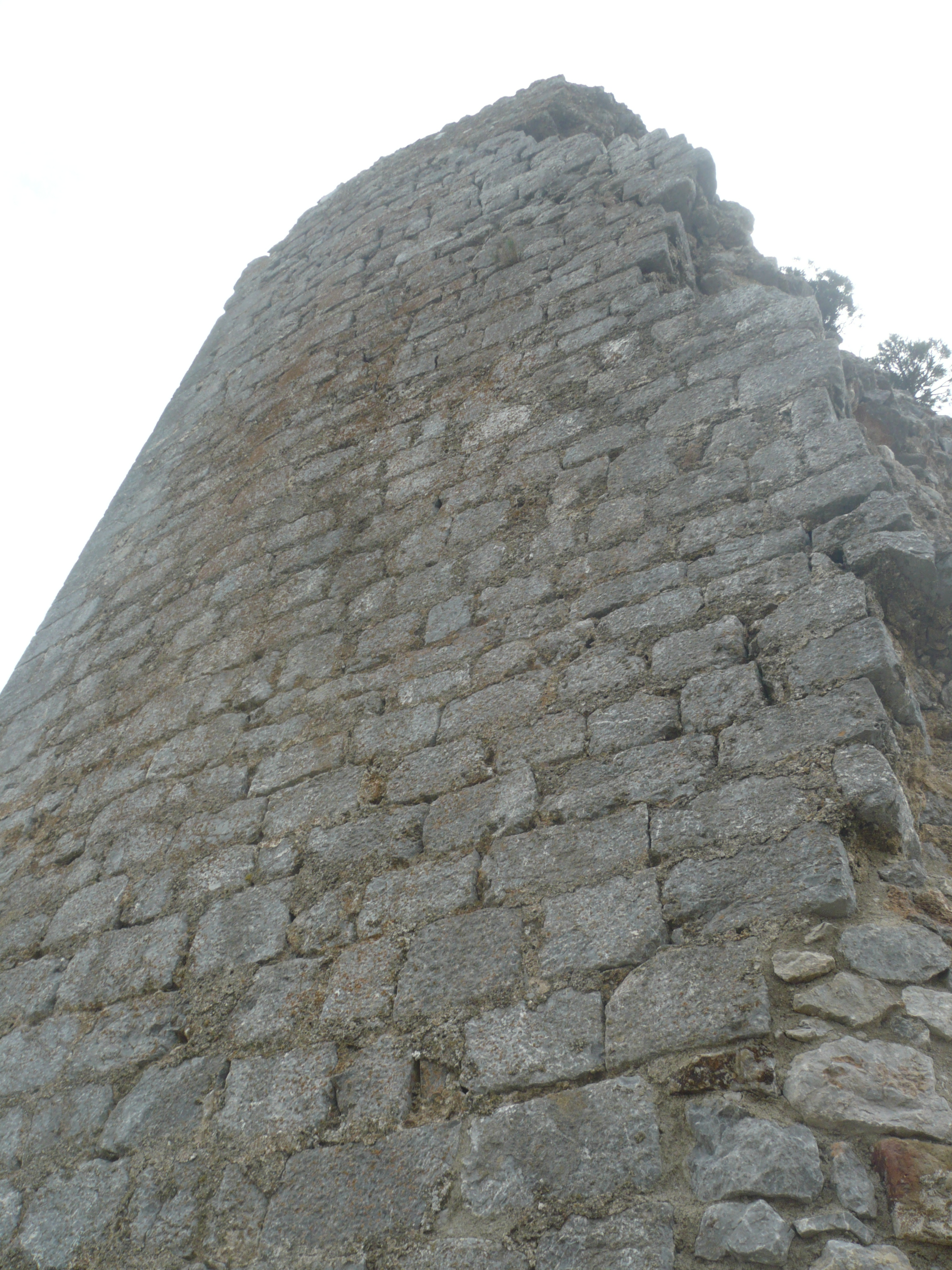 Tour du château de Tautavel vue depuis le nord .